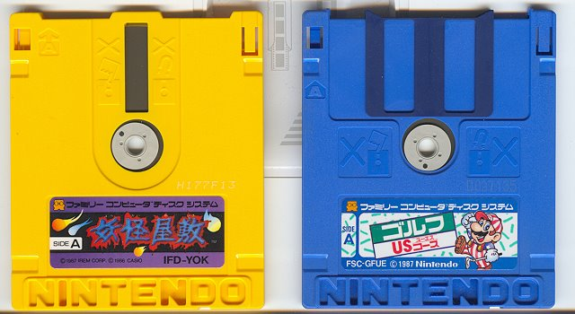 Famicom Disks